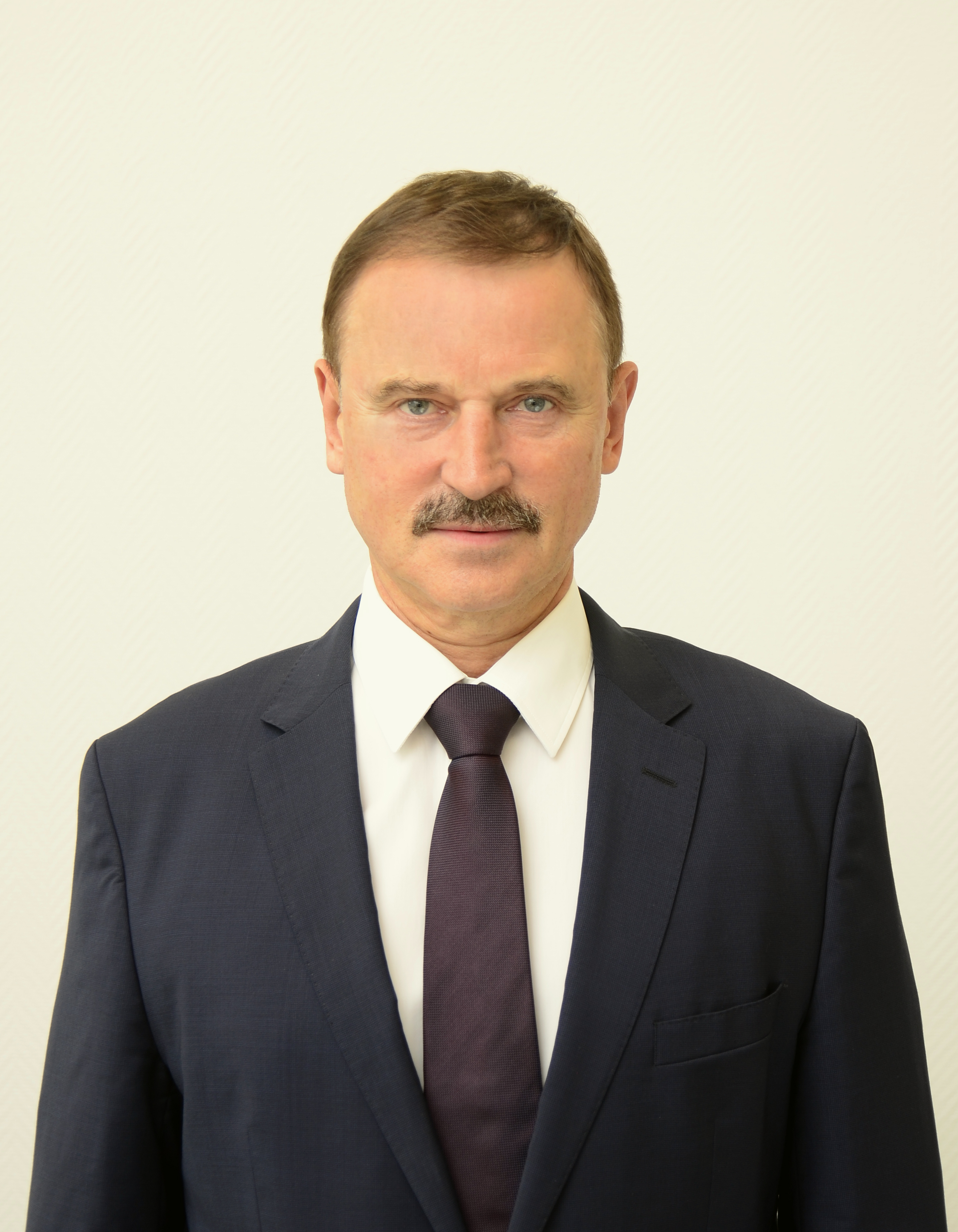 Сергей Алексеевич Веремеенко